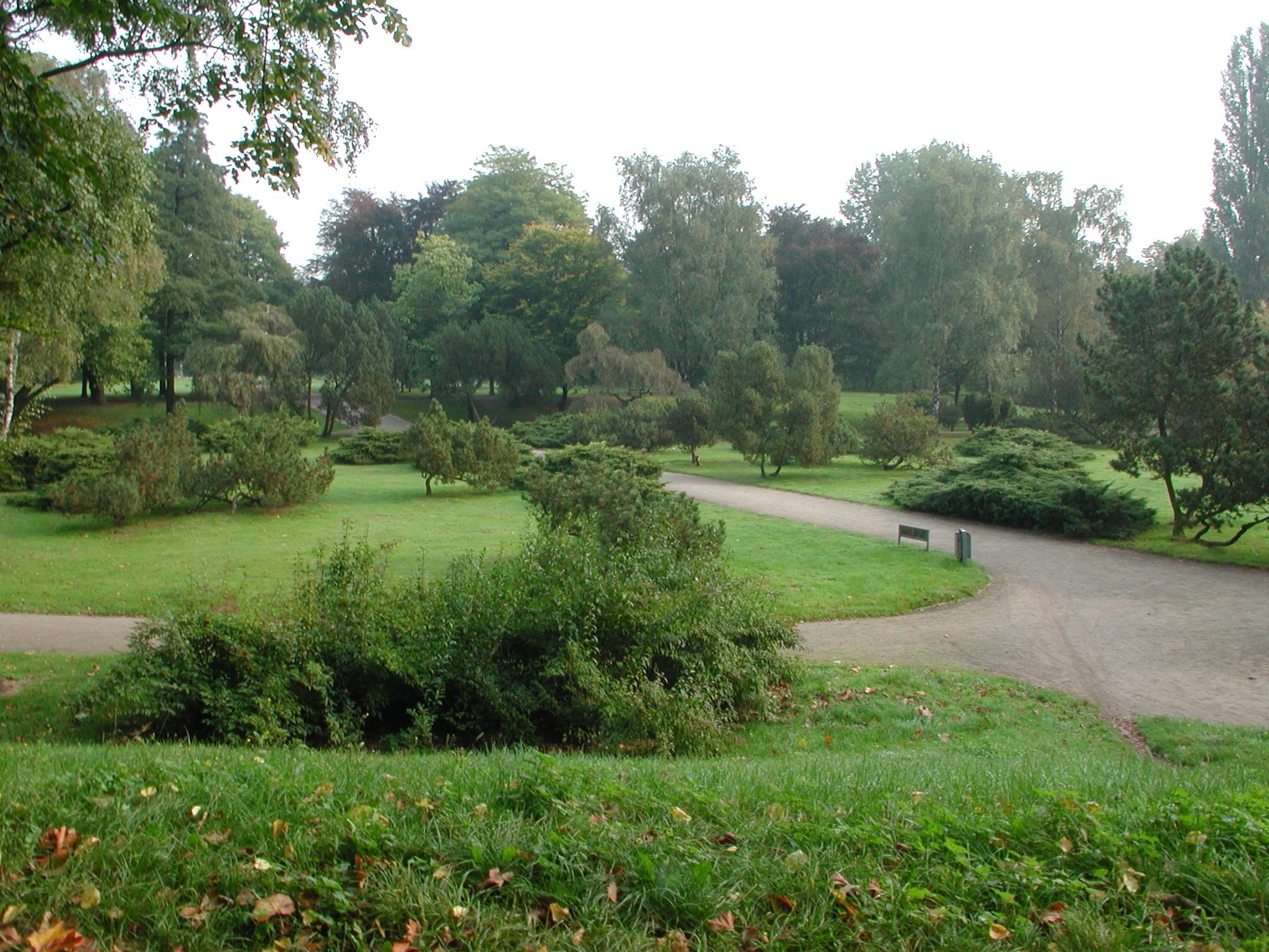 Neuer Teil im Moerser Stadtpark mit Birkenhain